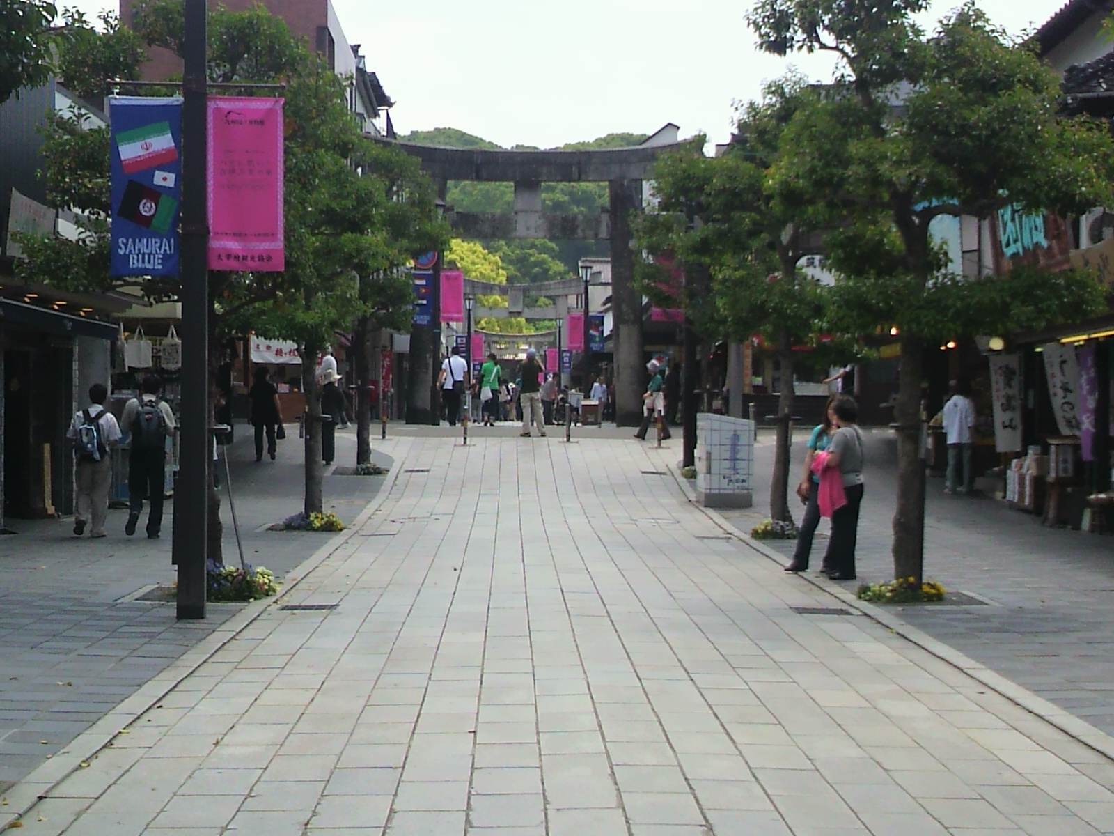 太宰府天満宮への参道。